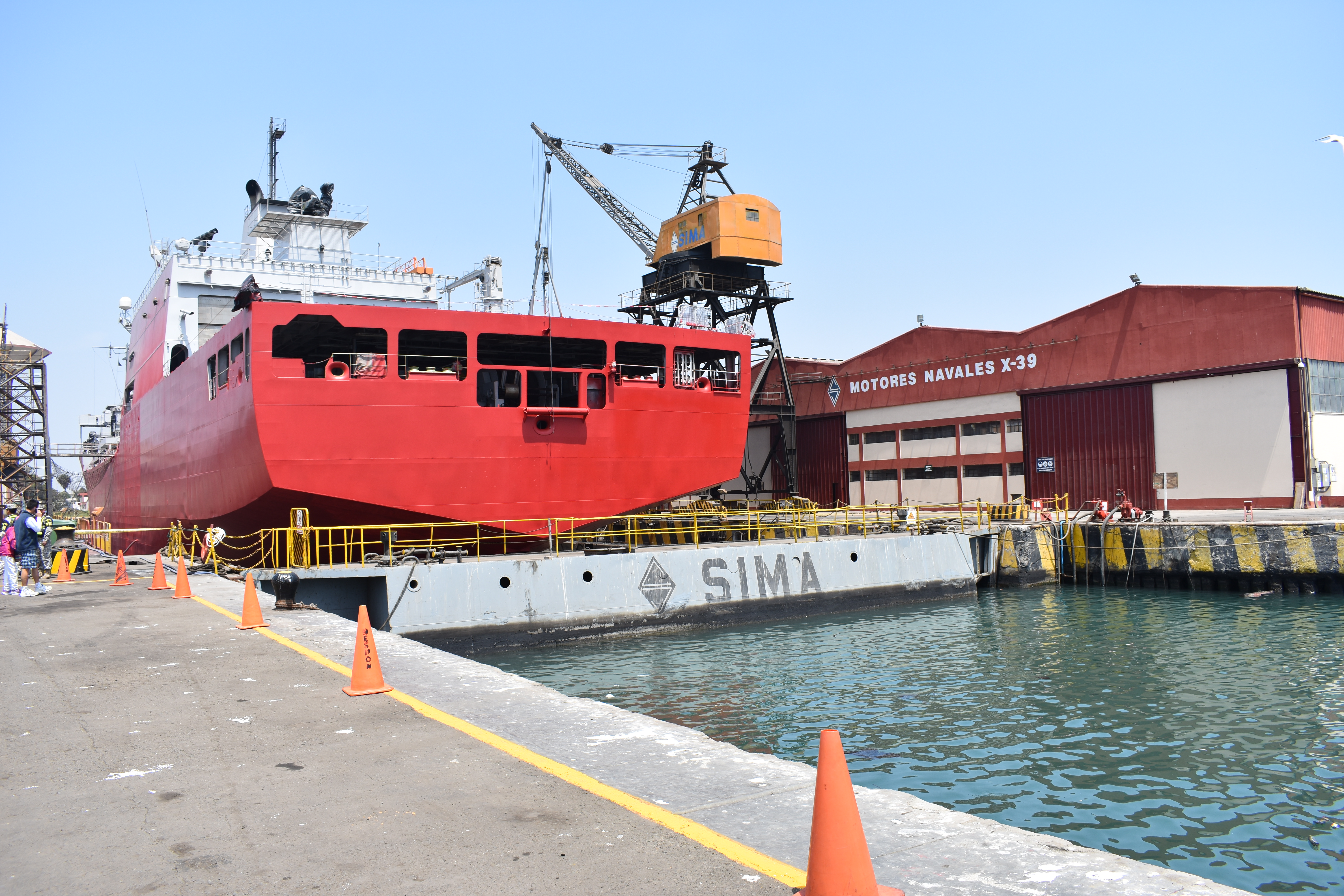 Dique del SIMA sede Callao